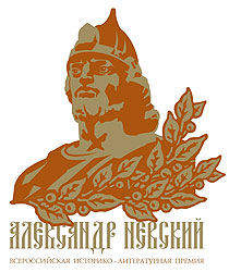 Всероссийская историко-литературная премия "Александр Невский". Логотип.